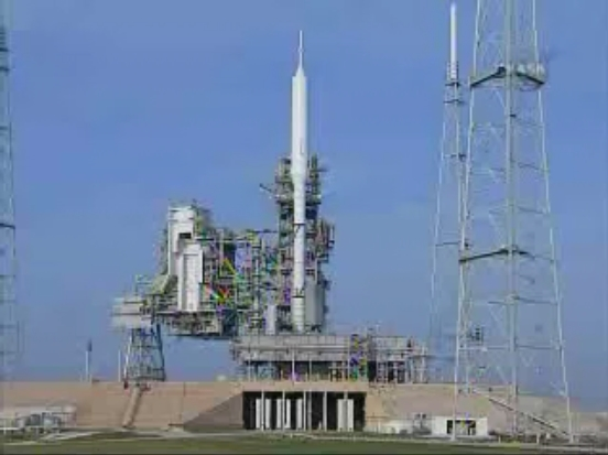 Ares I-X sur le pas de tir à 14 h 8 UTC